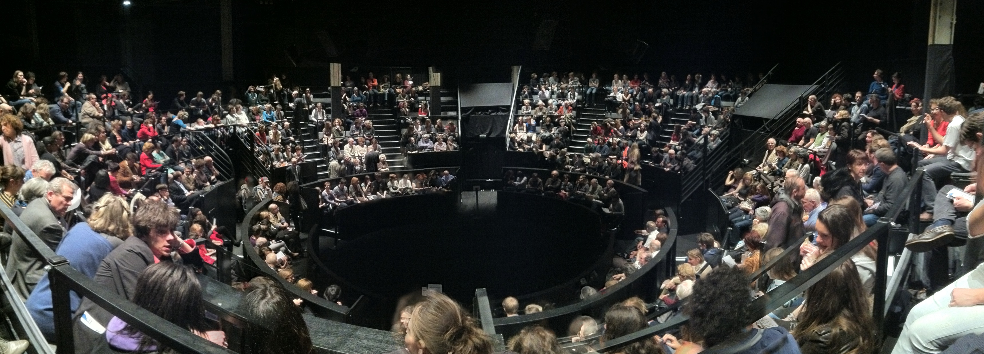 Au théâtre de l'Odéon - Ateliers Berthier jusqu'au 27 Mars 2011.